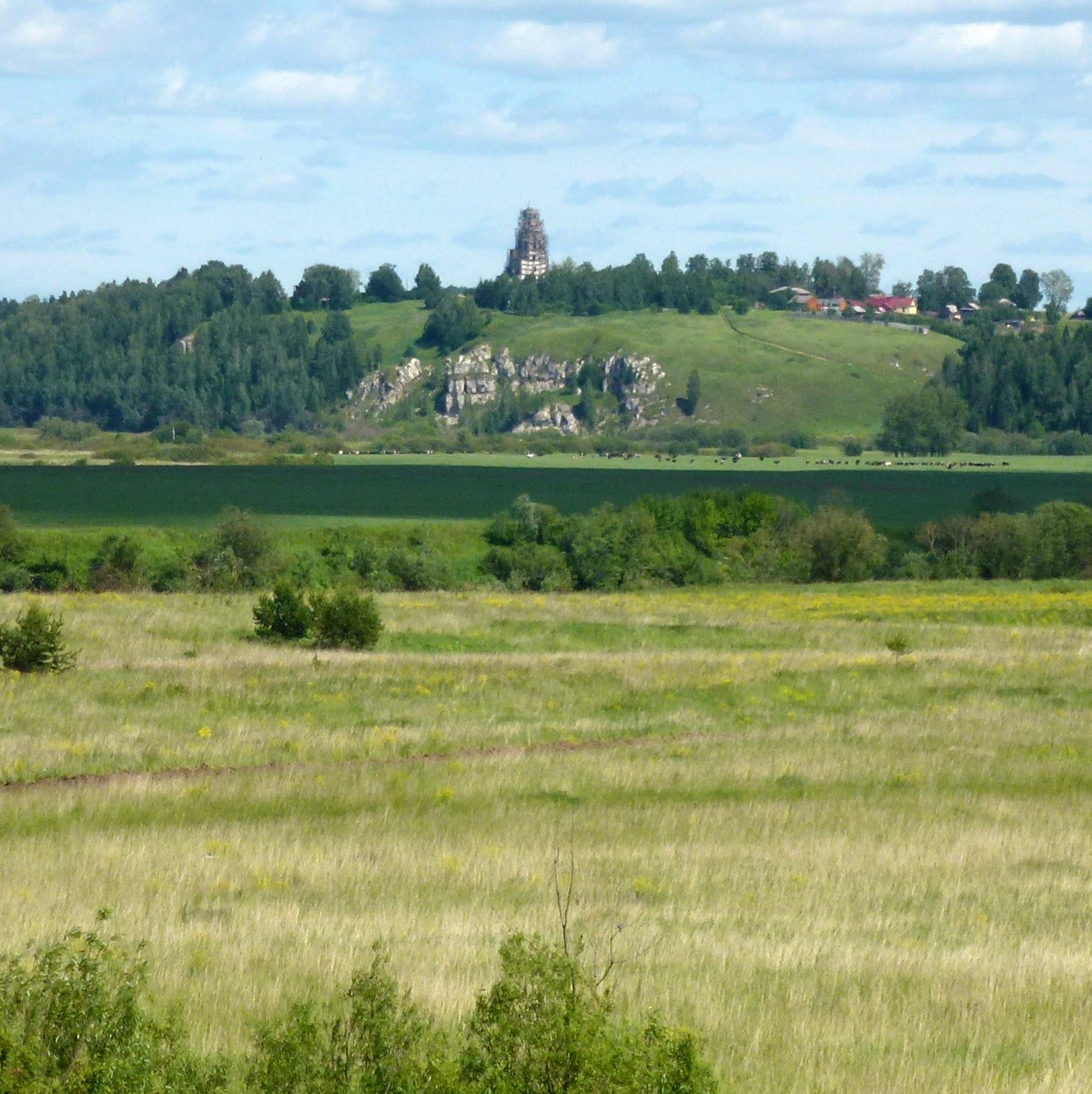 Каширино, Пермский край